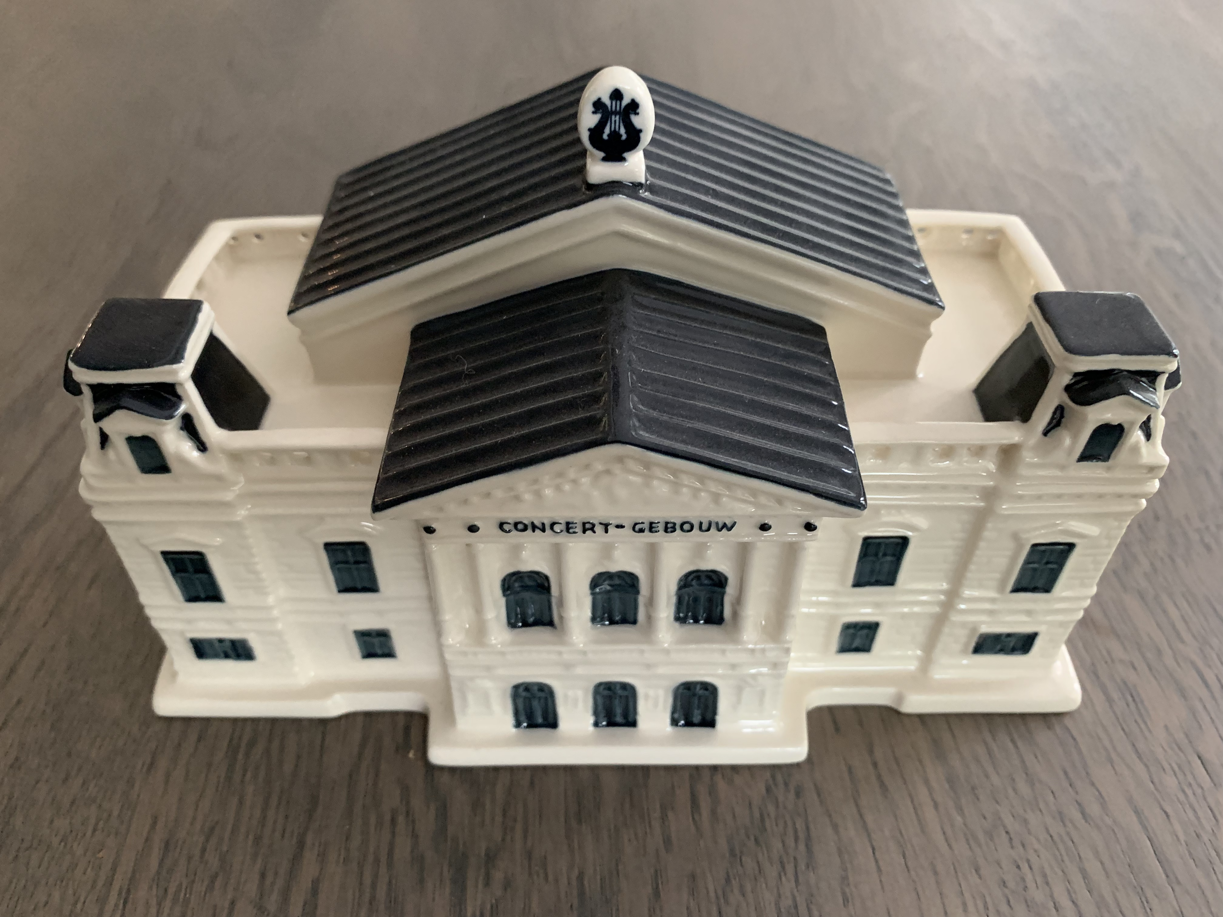 Klm huisje concertgebouw (collectors item)